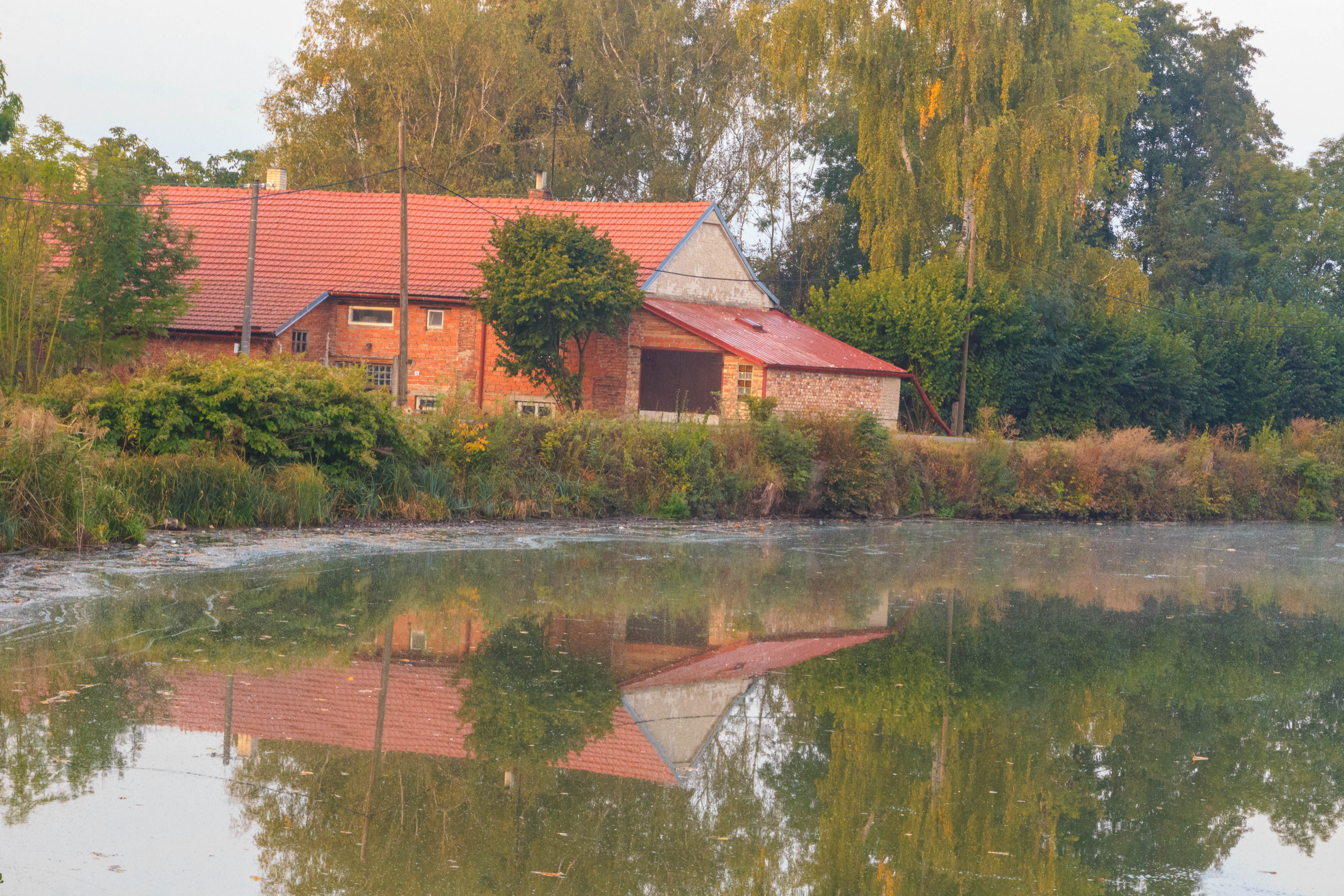 Na Baště - čp. 21